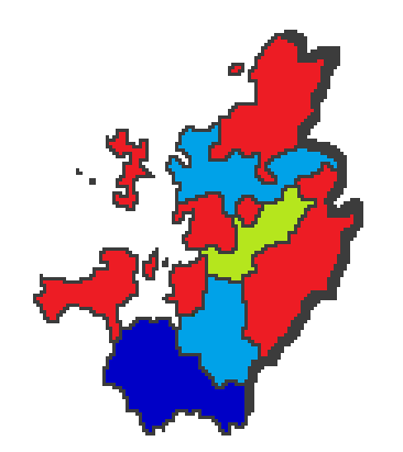 Alcaldes de la comarca del Salnés.